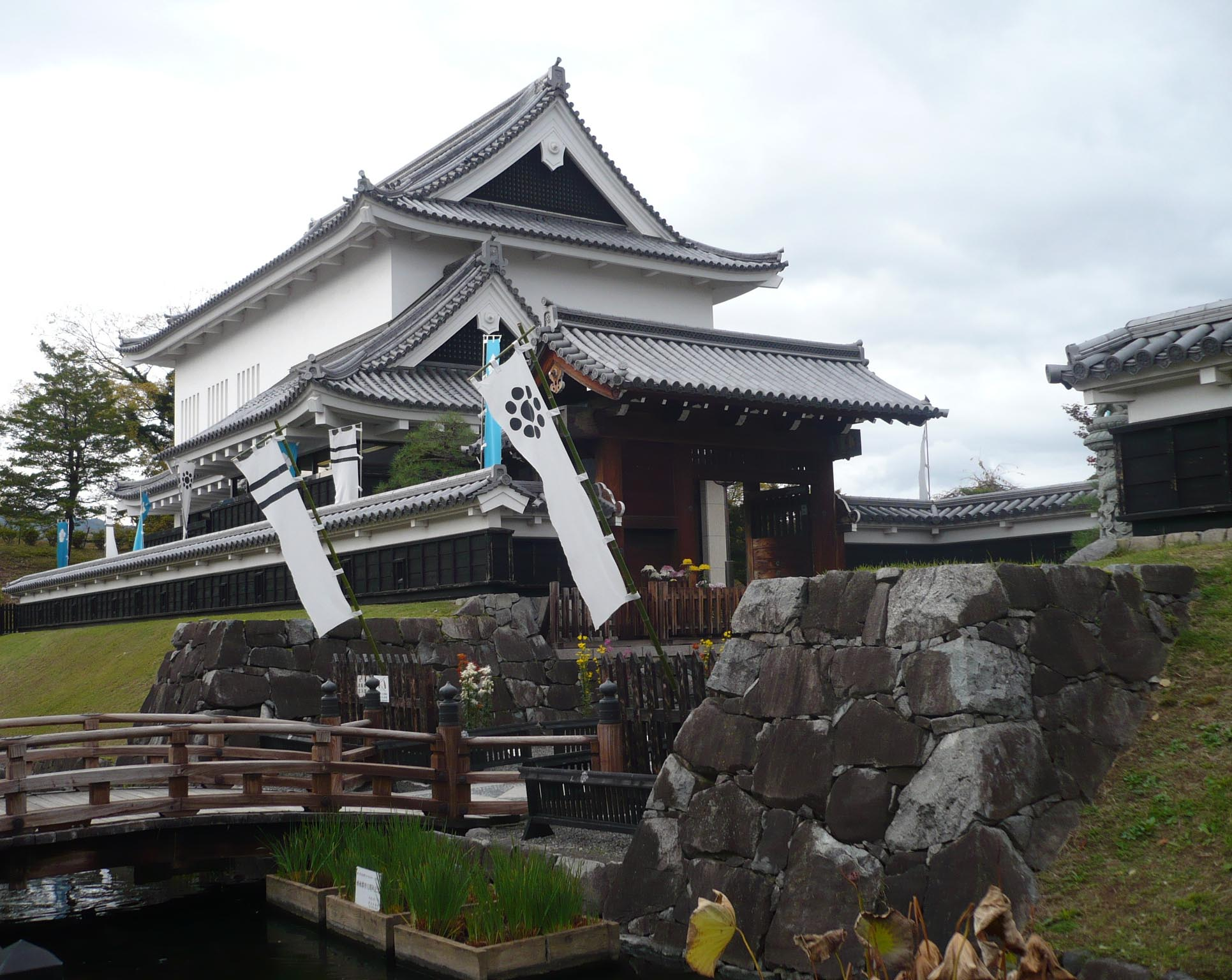 模擬櫓